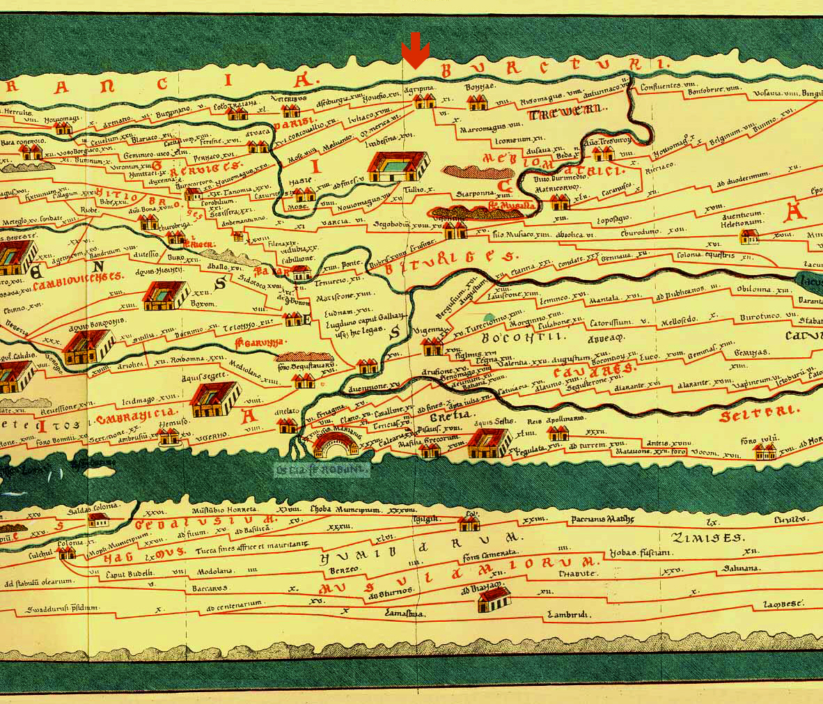 Ausschnitt aus der Tabula Peutingeriana mit der CCAA als Agrippina, Pfeil oben Mitte